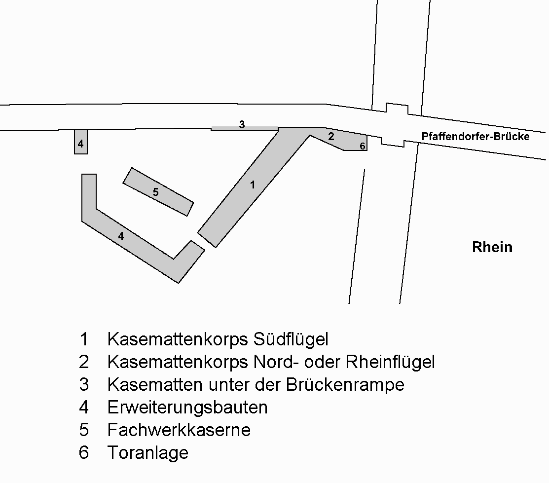 Vereinfachte Grundrisszeichnung der Rheinanschlusskaserne in Koblenz; Zustand von etwa 1918